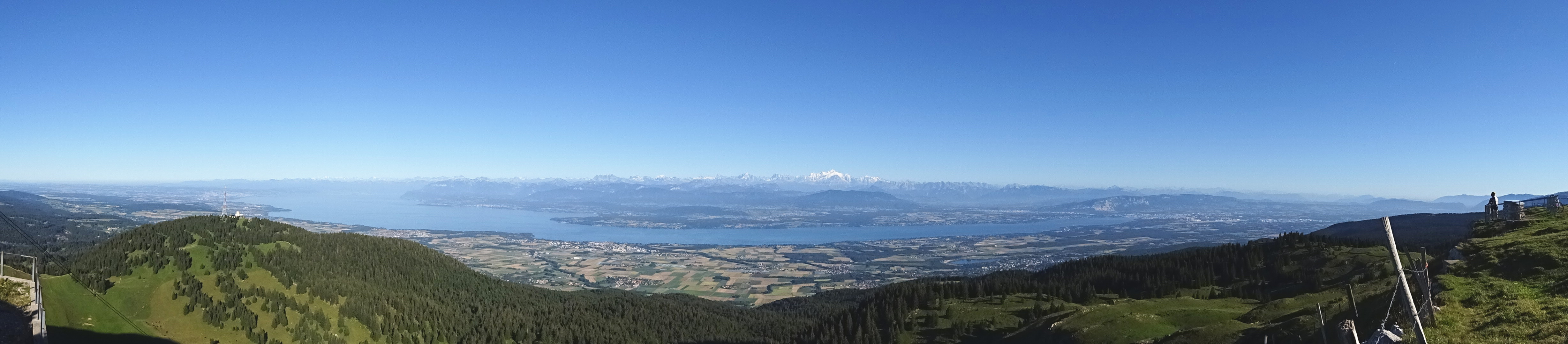 Vue sur l'arc lémanique